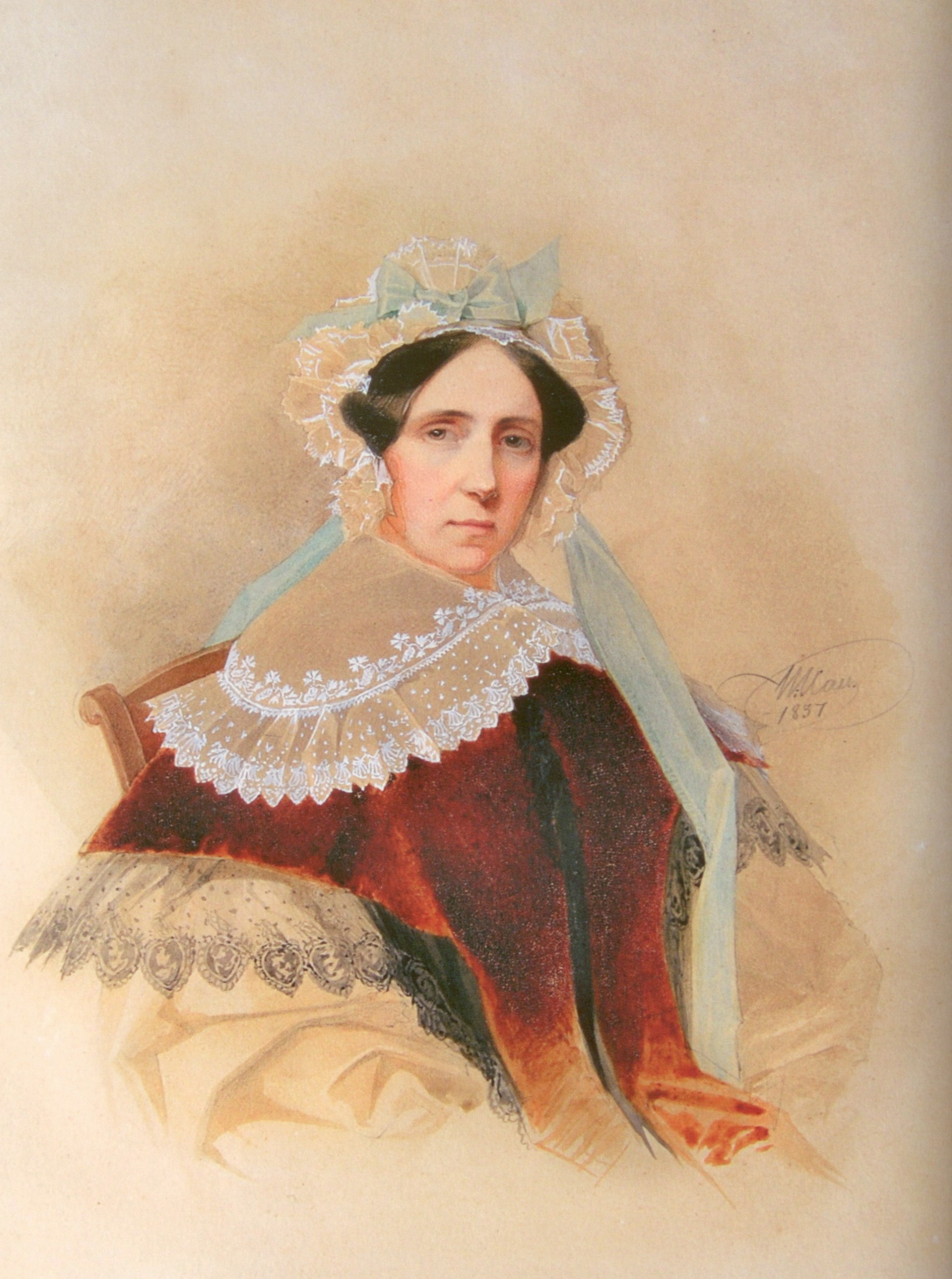 Юлия Фёдоровна Баранова (Доротея Елена Юлиана), урождённая Адлерберг (18 августа 1789 Ревель—16 июля 1864 Царское Село)—статс-дама, гофмейстерина, родоначальница графской линии Барановых.